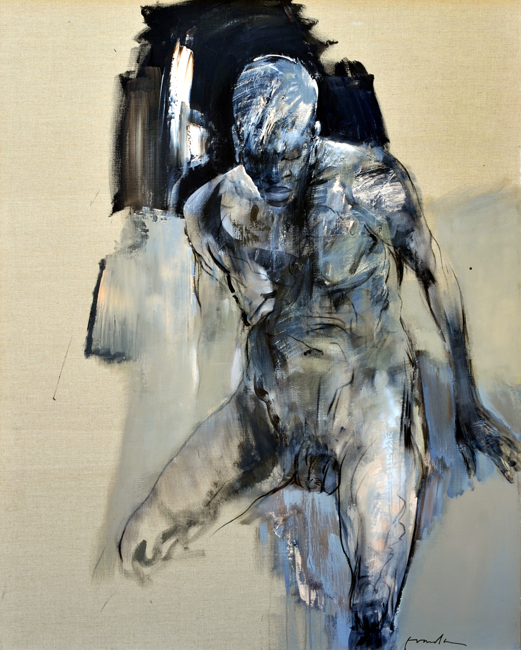 Franta, Sedící muž (2005), akryl, plátno 146 x 114 cm